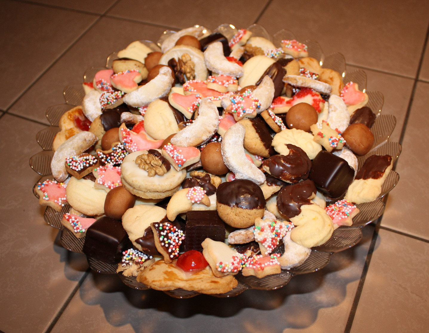 Weihnachtsgebäck